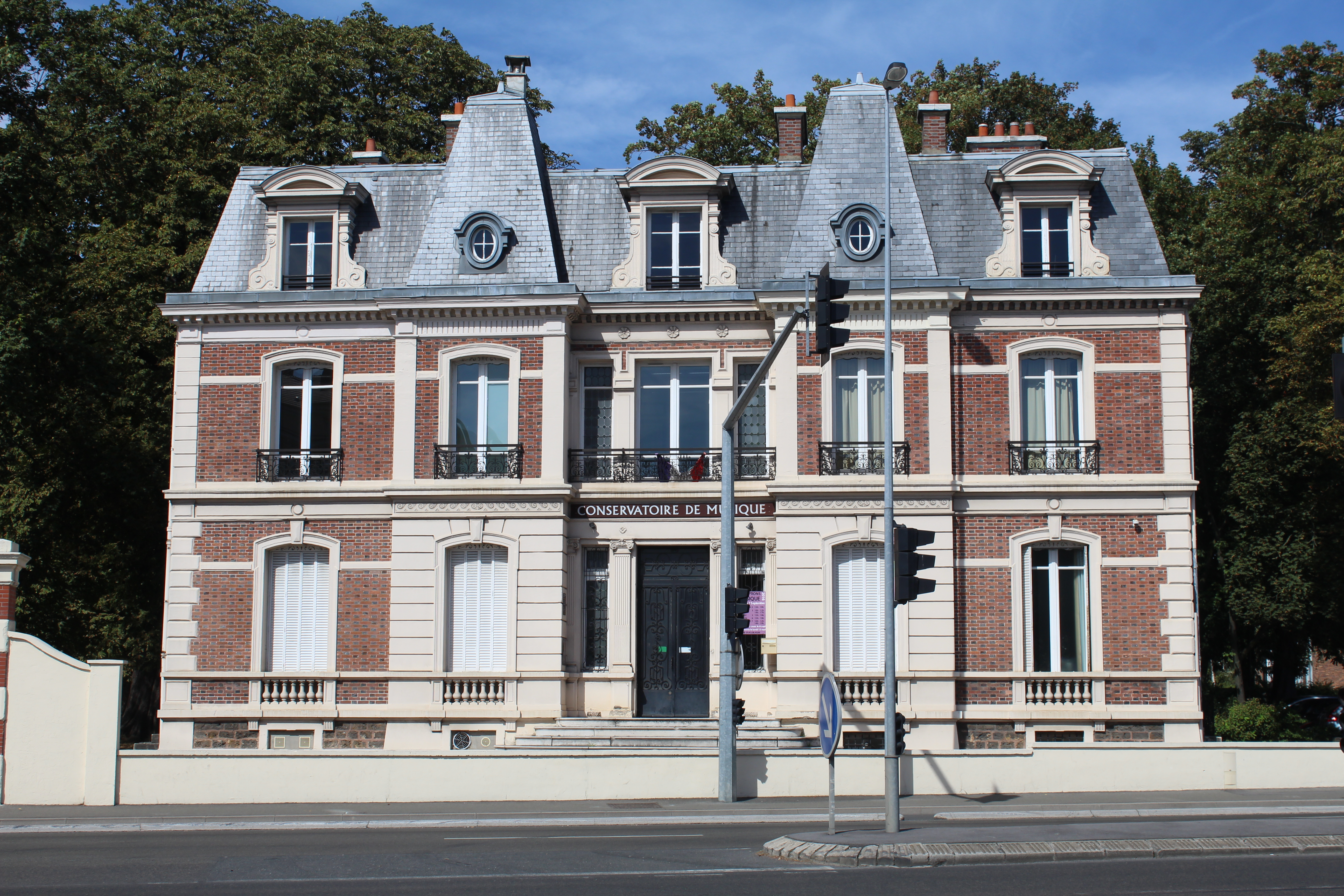 Conservatoire de musique de Neuilly-sur-Marne.